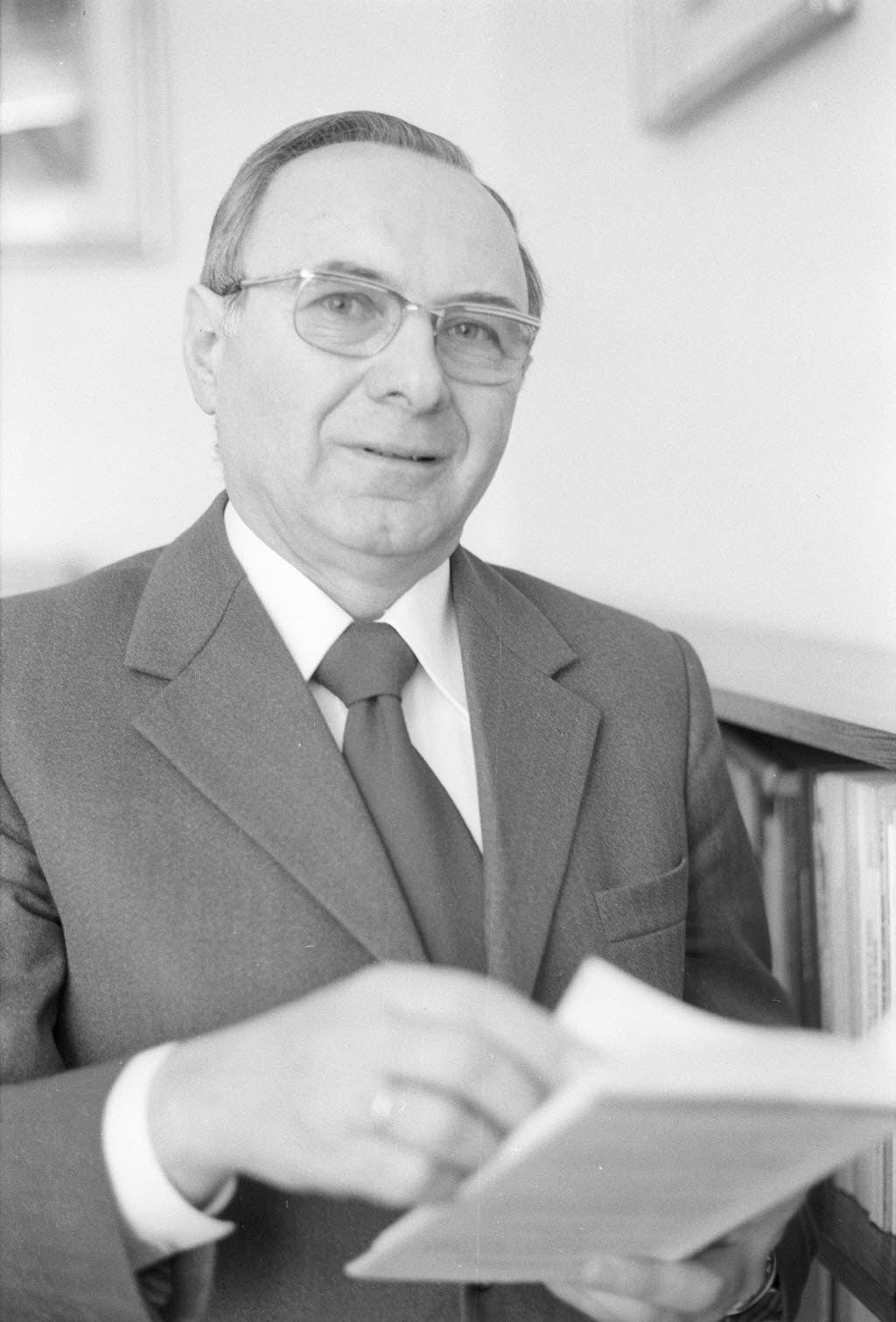 Präsident des Instituts für Weltwirtschaft (IfW) an der Christian-Albrechts-Universität (CAU).